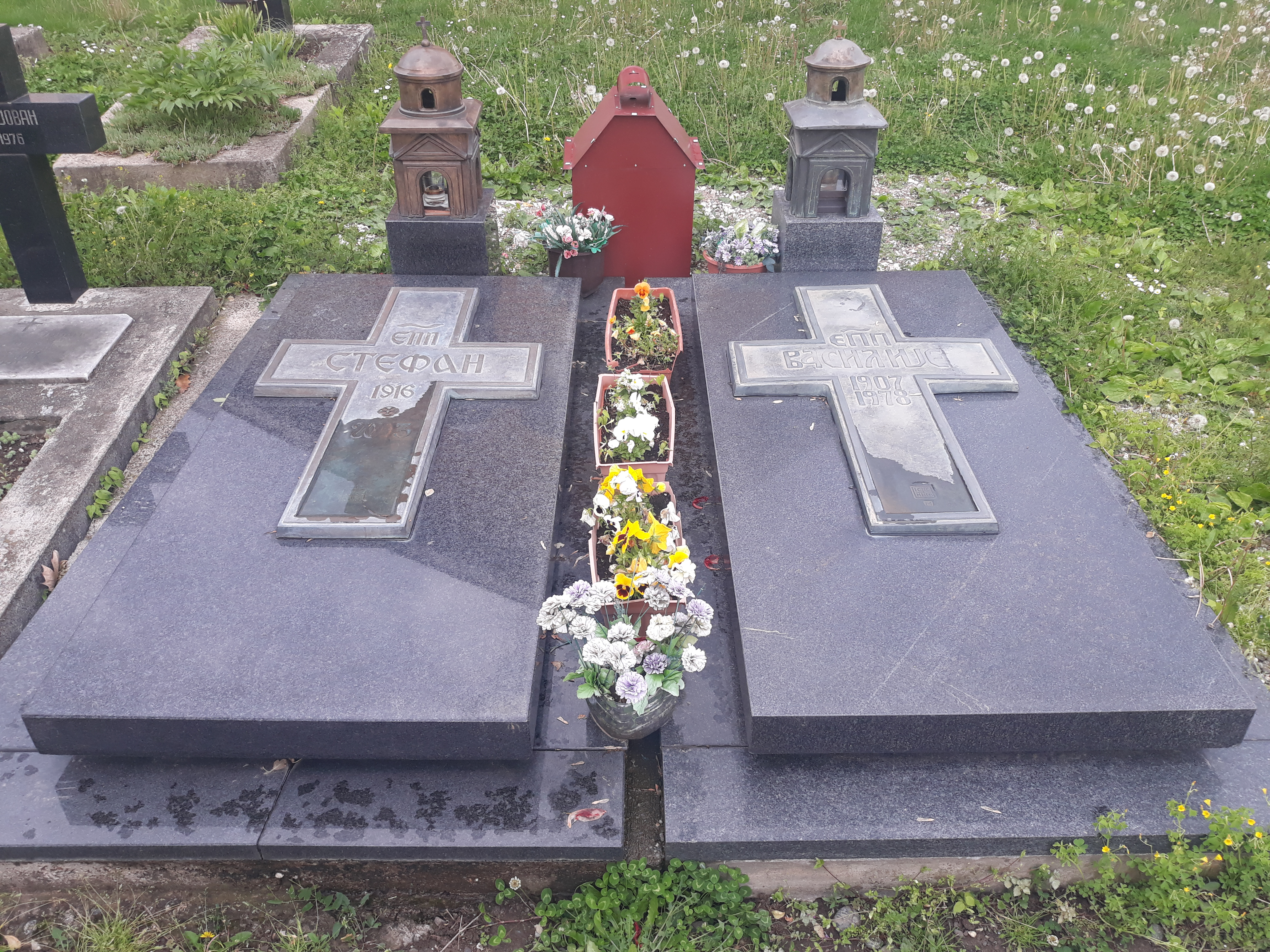 Манастир Жича и околина, фотографисани у априлу 2019. године.